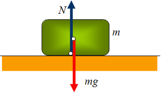 Diagrama de fuerzas que actúan sobre un cuerpo de masa m en reposo sobre una superficie horizontal.